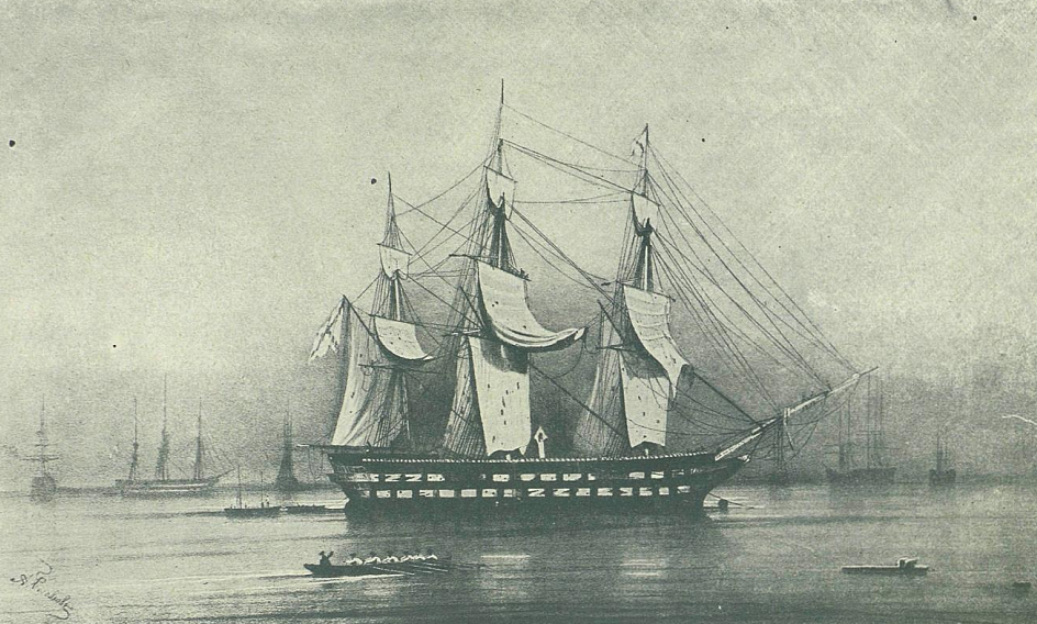 84-пушечный корабль «Императрица Мария» под флагом П.С. Нахимова после победы в Синопском сражении